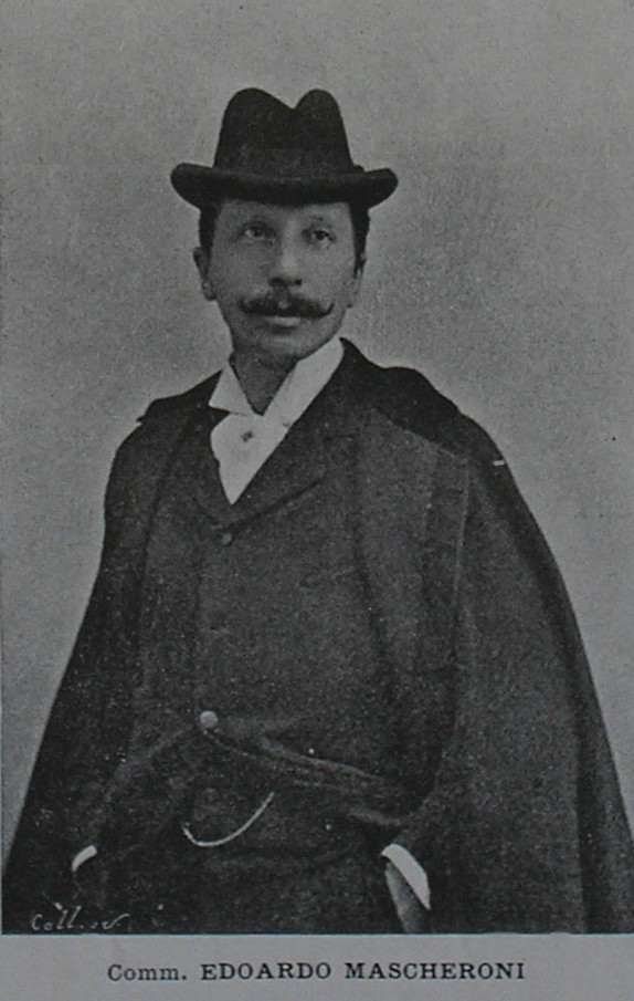 Retrato de Edoardo [Eduardo] Mascheroni aparecido en la revista El Mundo del Arte (Buenos Aires, 1891-1895).